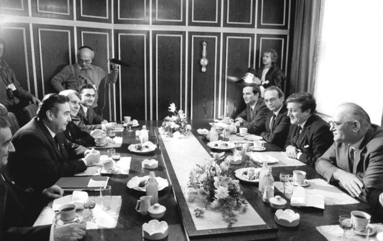 ADN-ZB Kluge-14.3.83-eng Leipzig: Frühjahrsmesse 83 - Der DDR-Außenhandelsminister Horst Sölle (2.v.l.) führte mit Dr. Dieter von Würzen (2.v.r.), Staatssekretär im Bundesministerium für Wirtschaft der BRD, ein Gespräch. An der Begegnung nahm auch der Leiter der Ständigen Vertretung der BRD in der DDR, Dr. Hans-Otto Bräutigam (3.v.r.) teil.